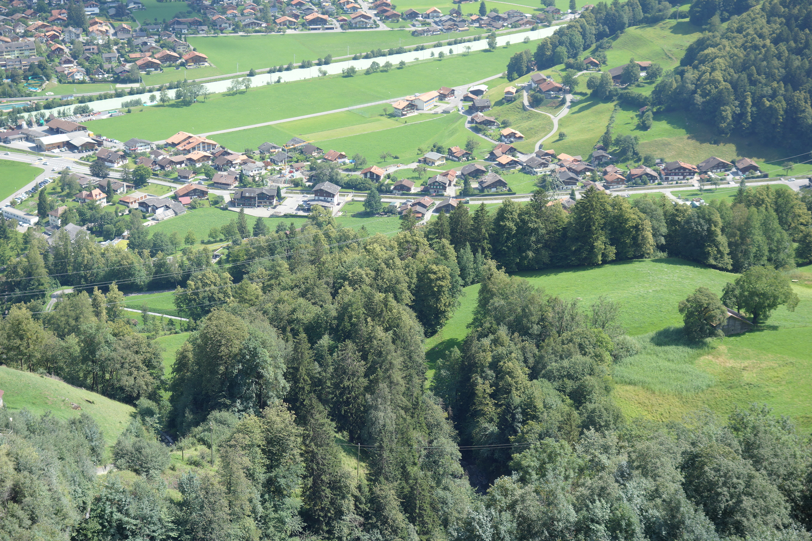 Willigen, Schattenhalb BE, Schweiz